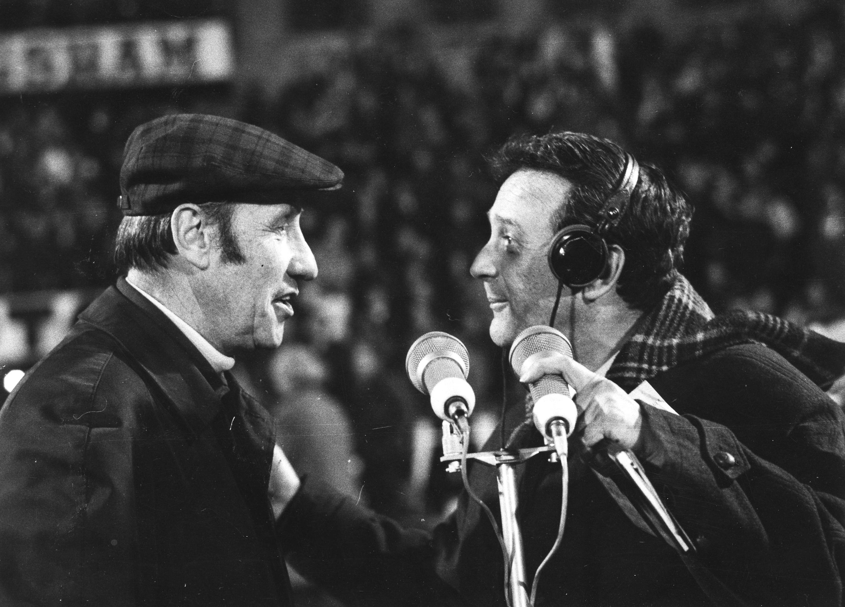 Helmuth Schön az NSZK labdarúgó-válogatott szövetségi kapitánya nyilatkozik Szepesi Györgynek a Magyar Rádió sportriporterének. Location: Hungary, Budapest XIV., Népstadion Tags: Budapest Title: Helmuth Schön az NSZK labdarúgó-válogatott szövetségi kapitánya nyilatkozik Szepesi Györgynek a Magyar Rádió sportriporterének.